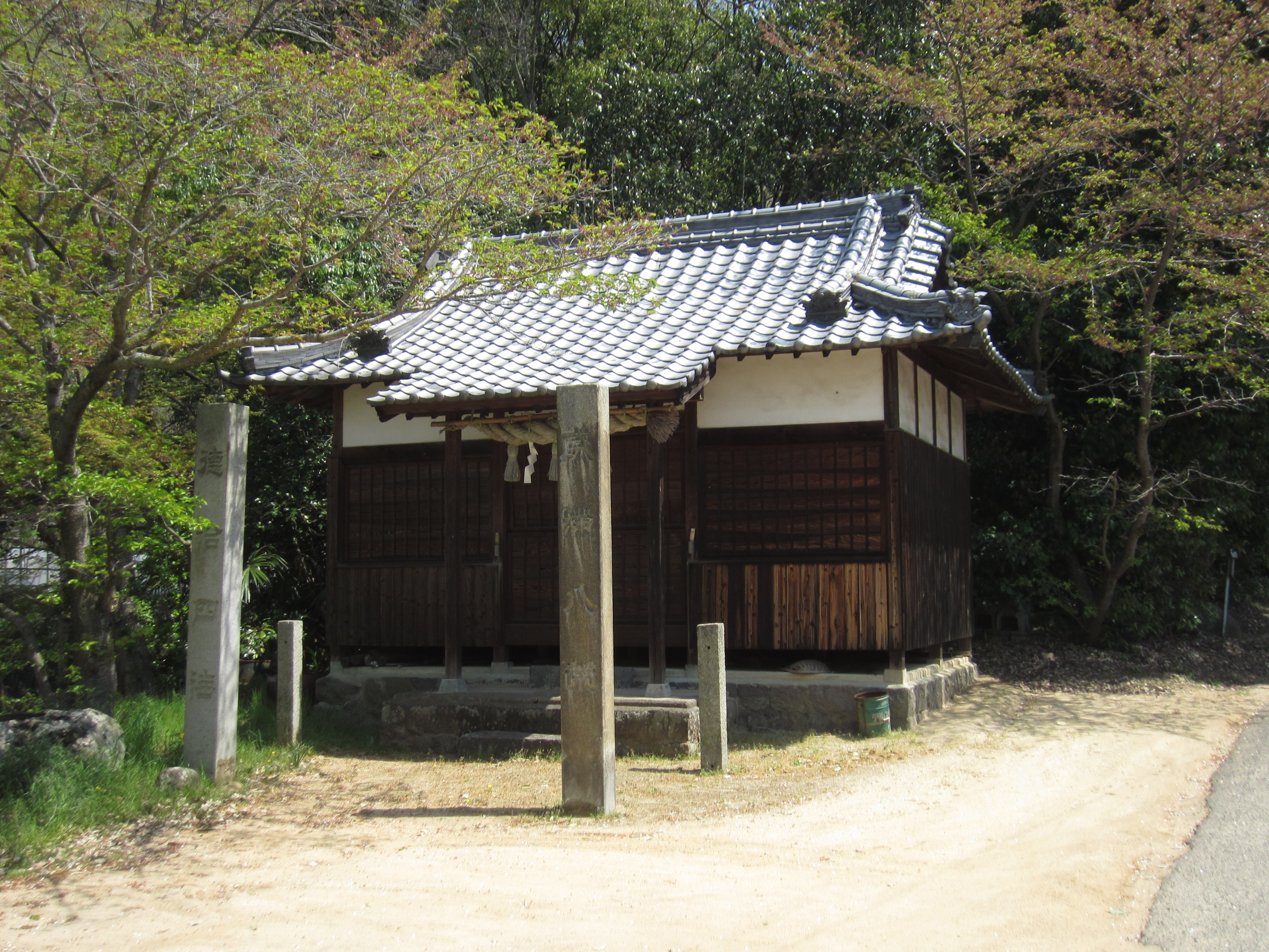 神谷神社 摂社荒神社